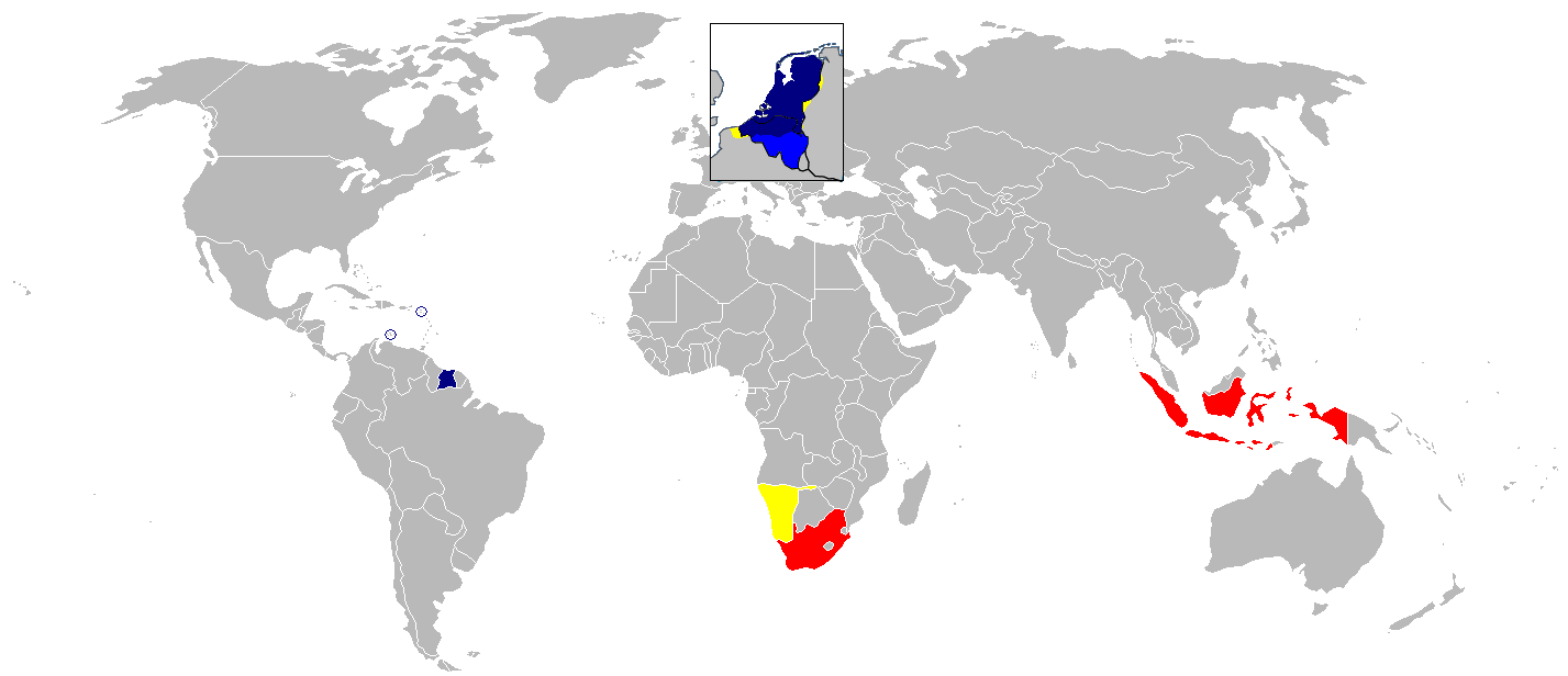 Zelfgemaakte kaart